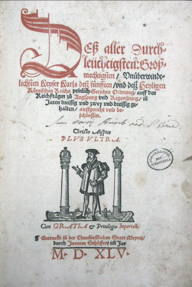 Gerichtsordnung Kaiser Karls V., Mainz 1545, Titelblatt eines Exemplars aus der Leiningen'schen Hofbibliothek Amorbach, zuvor Kloster Amorbach